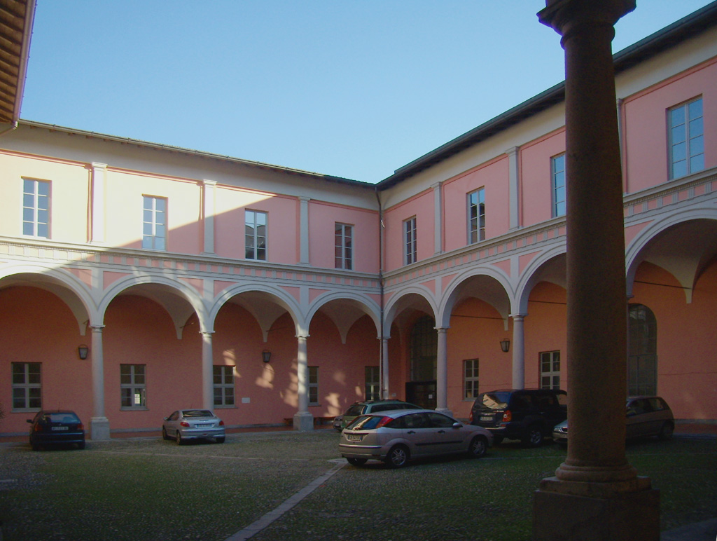 Il chiostro dell'ex monastero di San Benedetto a Lodi, attuale liceo ginnasio "Pietro Verri"